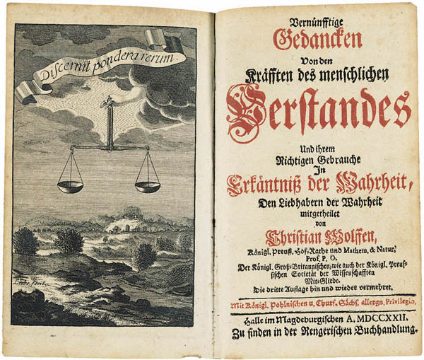 Page titre de la Deutsche Logik de Christian Wolff